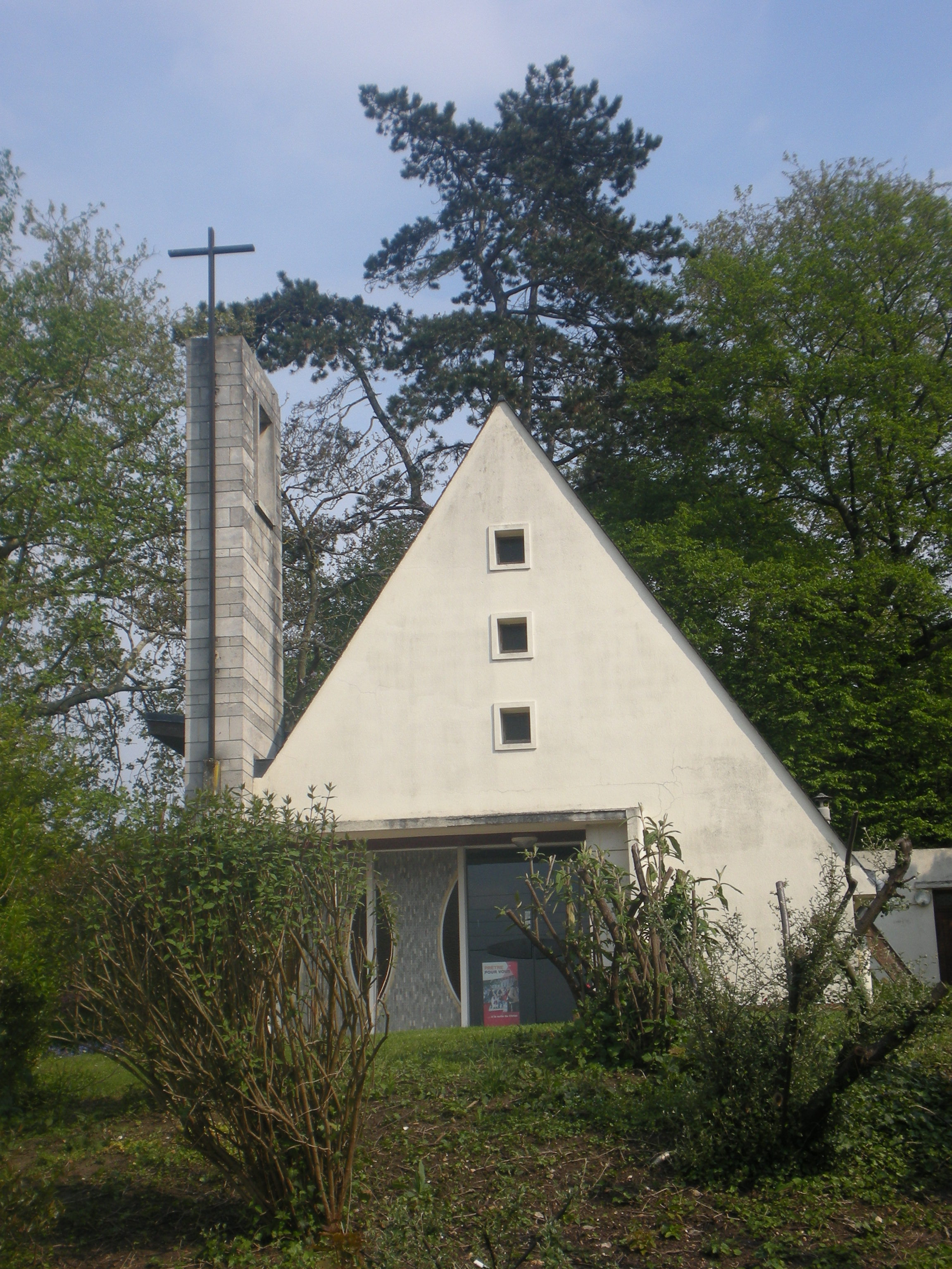 La chapelle de l'hôpital général